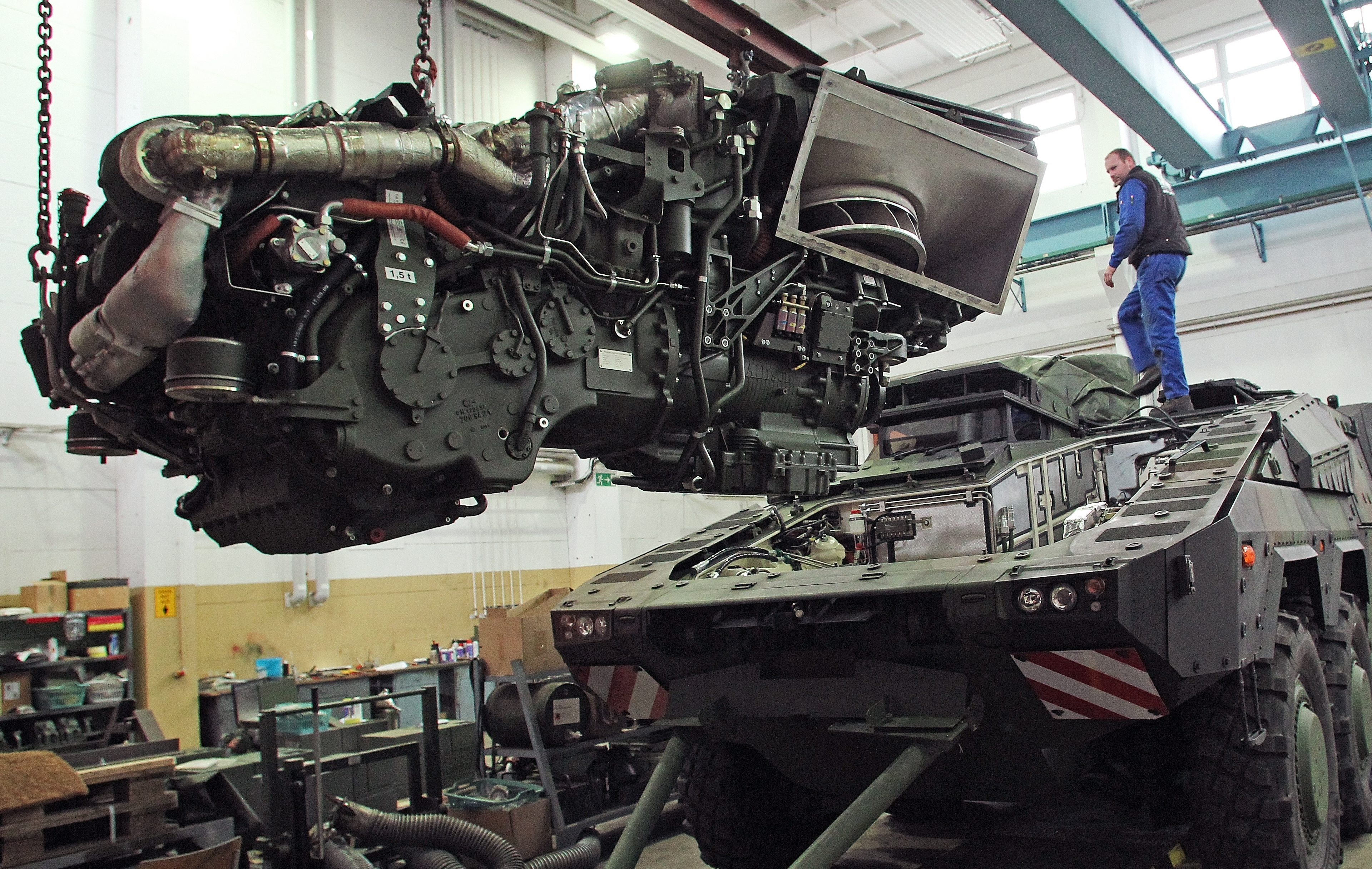 Im Materiallager Zeithain wird der GTK Boxer für seinen Einsatz in Afghanistan vorbereitet. Triebwerkstausch durch Mitarbeiter der Firma Krauss-Maffei Wegmann. Mit dem GTK Boxer wurde eine neue Generation gepanzerter Transportfahrzeuge mittlerer Gewichtsklasse entwickelt. Deren besonderes Merkmal liegt in der Erfüllung von Einzelforderungen auf zukunftsweisendem Niveau und in der ausgewogenen Abstimmung konkurrierender Anforderungen. Die Fahrzeugfamilie GTK Boxer wurde modular entworfen und nutzt ein gemeinsames Basisfahrzeug, das aus einem Fahrmodul und einem Missionsmodul besteht. Dieses Basisfahrzeug bildet die Grundlage für jede Fahrzeugversion/ -variante oder -modifikation. Das Fahrmodul umfasst den vollständigen Antriebsstrang und alle Antriebskomponenten, den Fahrerplatz, wichtige Unterstützungskomponenten wie die ABC-Schutzeinrichtung, die Klimaanlage, die Brandunterdrückungsanlage für den Motorraum und alle Schnittstellen zum Missionsmodul. © Bundeswehr / Mandt